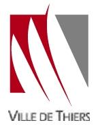 Le logo de Thiers avec trois lames de couteau qui rappellent les voiles bu bateau de l'ancien blason